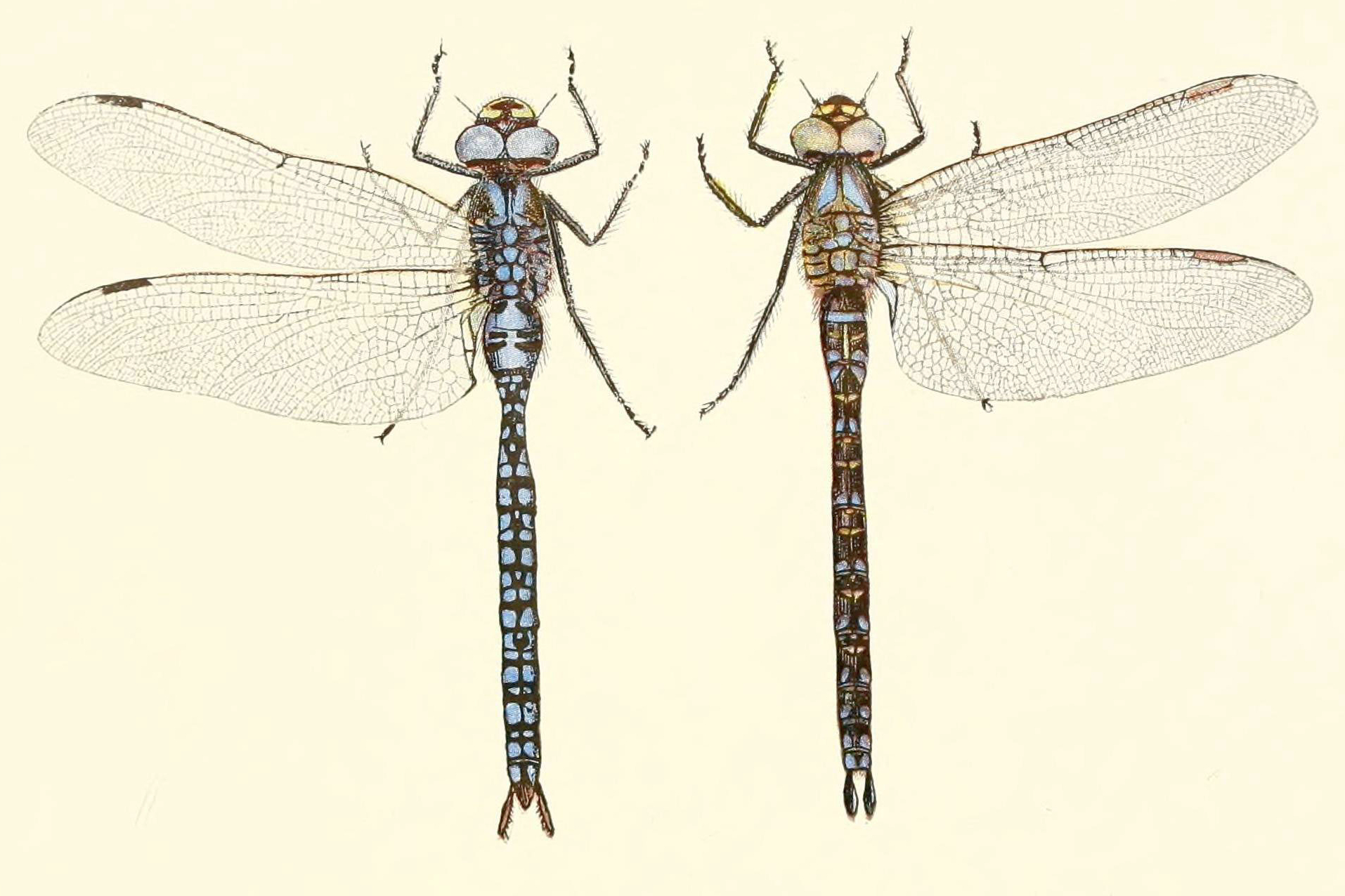 Plate XV. Aeshna caerulea